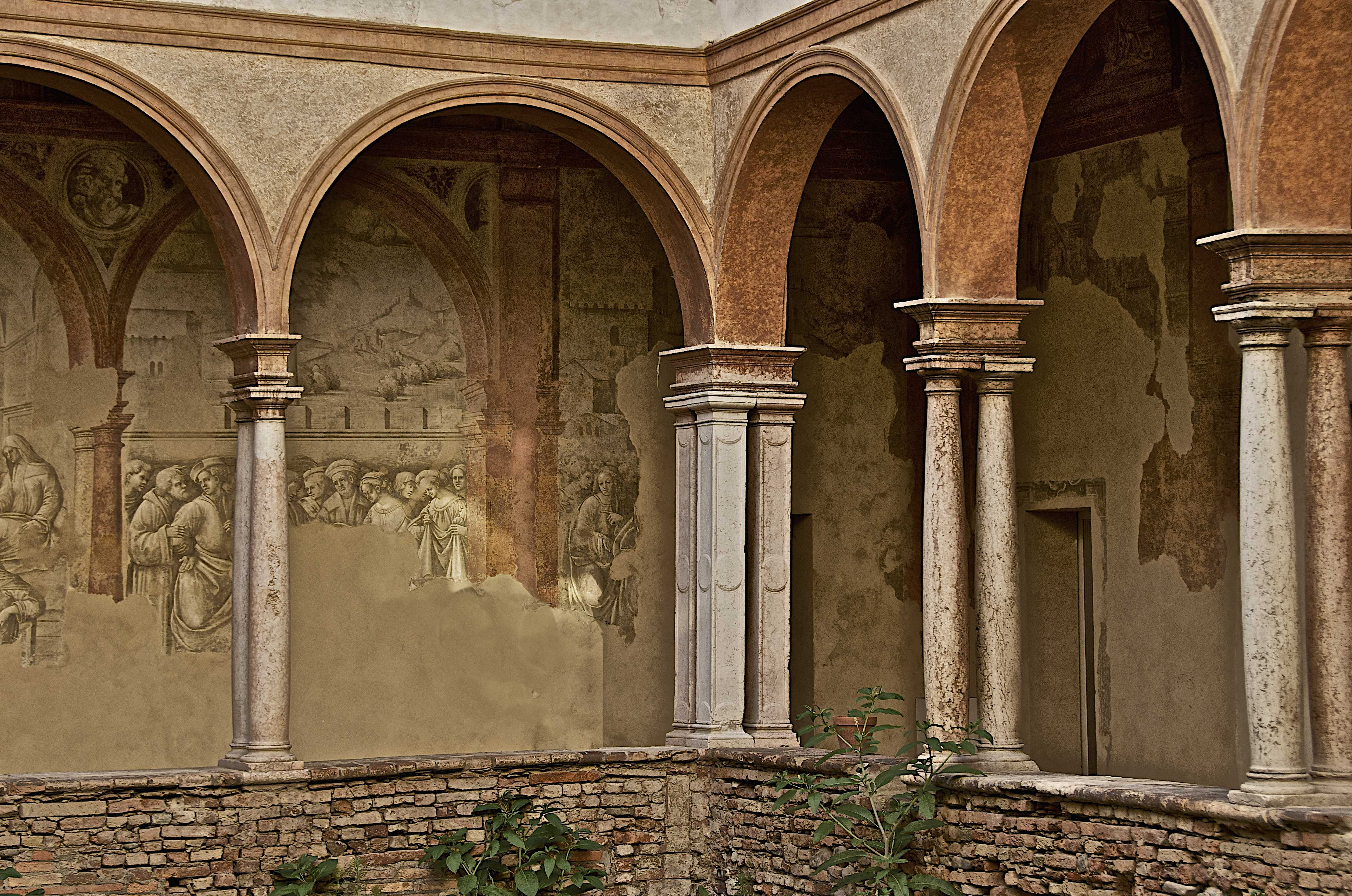 Chiostri di San Pietro This is a photo of a monument which is part of cultural heritage of Italy.